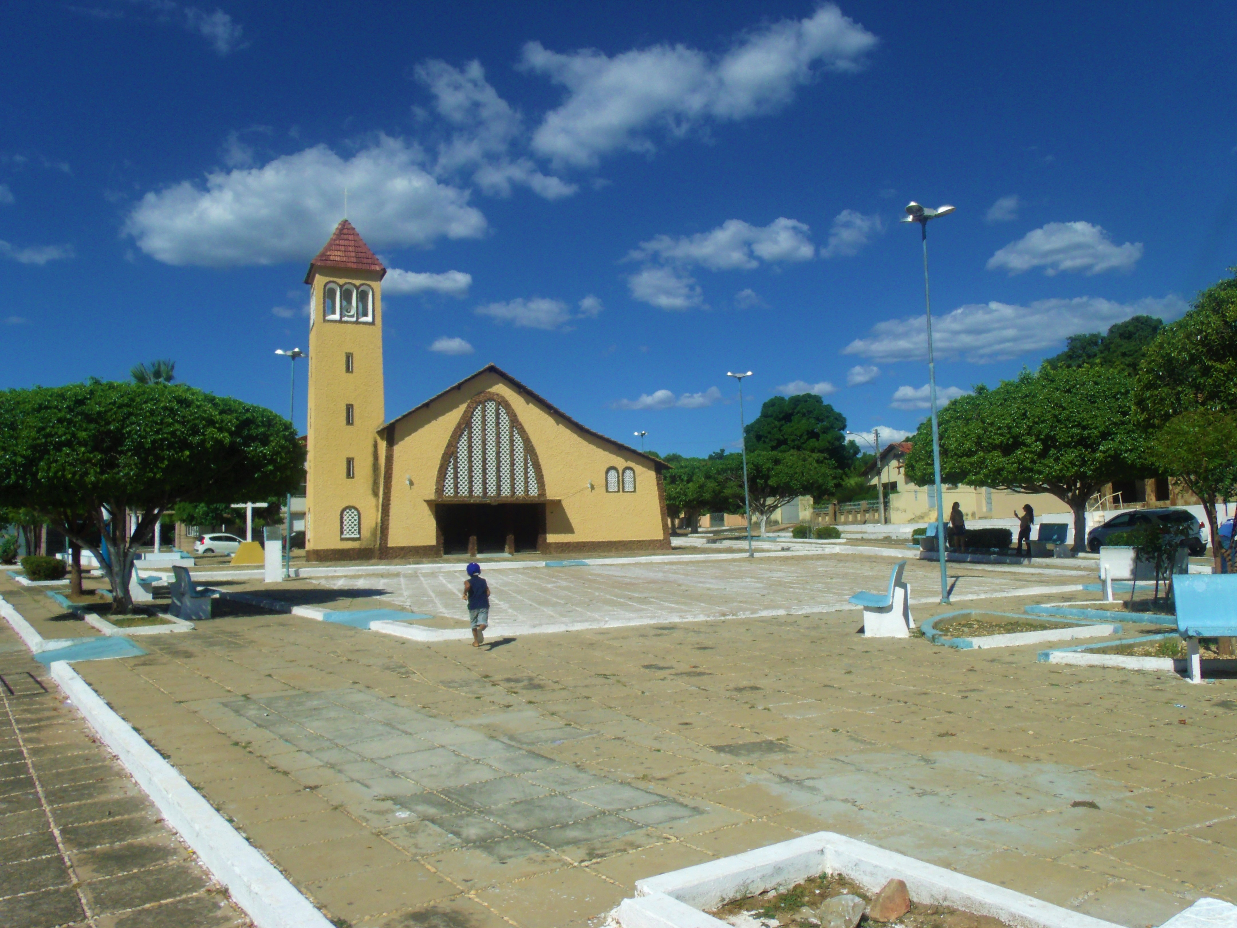 Igreja matriz de Brasileira (Piauí).